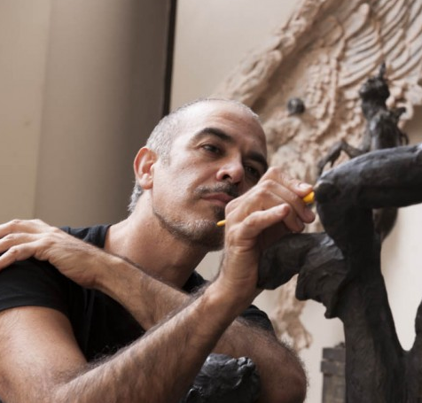 Javier Marín, escultor mexicano, en su taller.